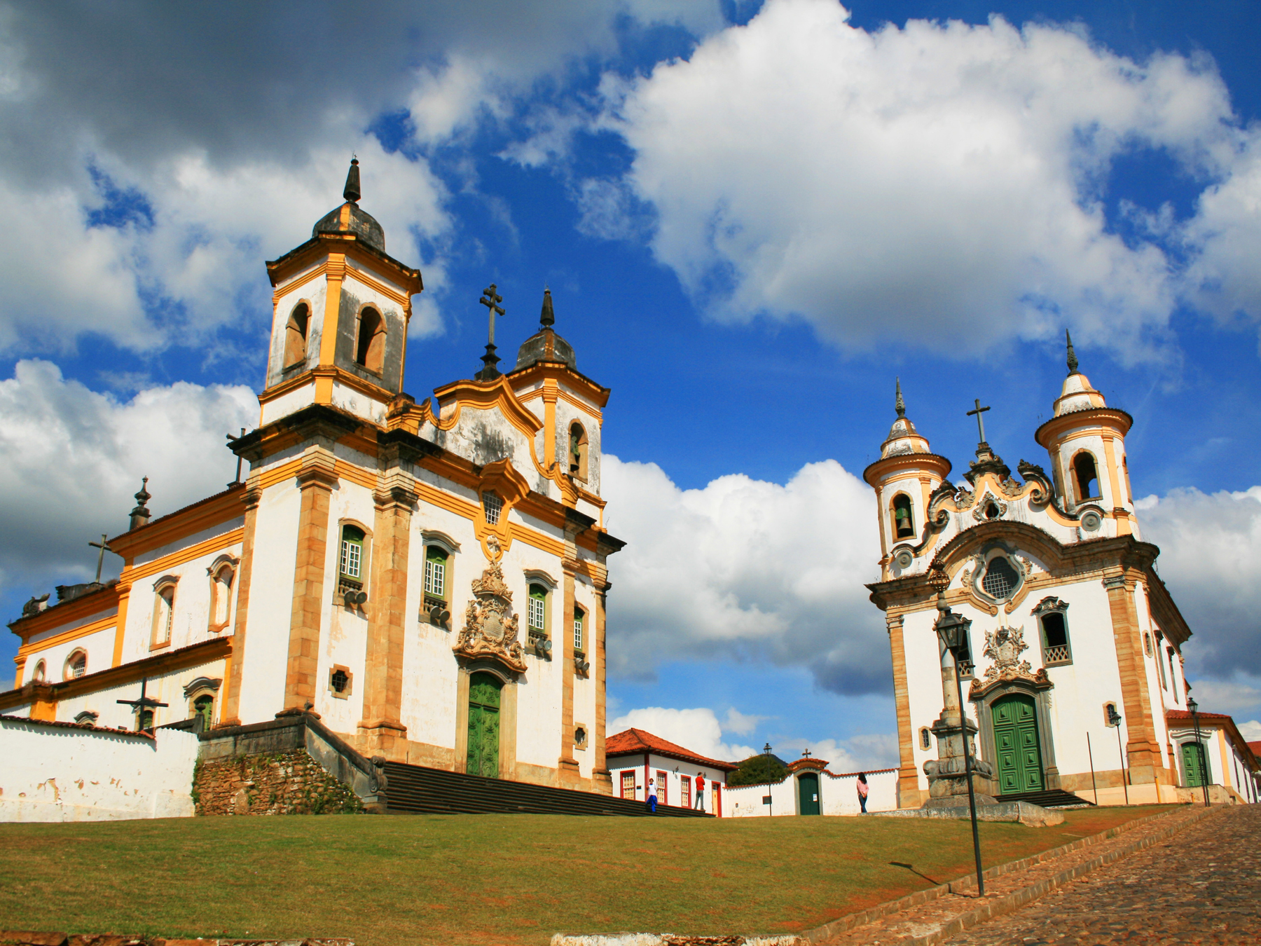 Mariana, MG: conjunto arquitetônico e urbanístico